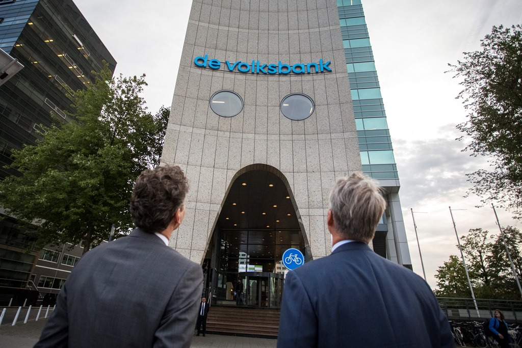 Jeroen Dijsselbloem (minister van Financiën) en Maurice Oostendorp (ceo van de Volksbank) bekijken het nieuwe logo op de gevel van het hoofdkantoor van de bank aan de Croeselaan 1 te Utrecht